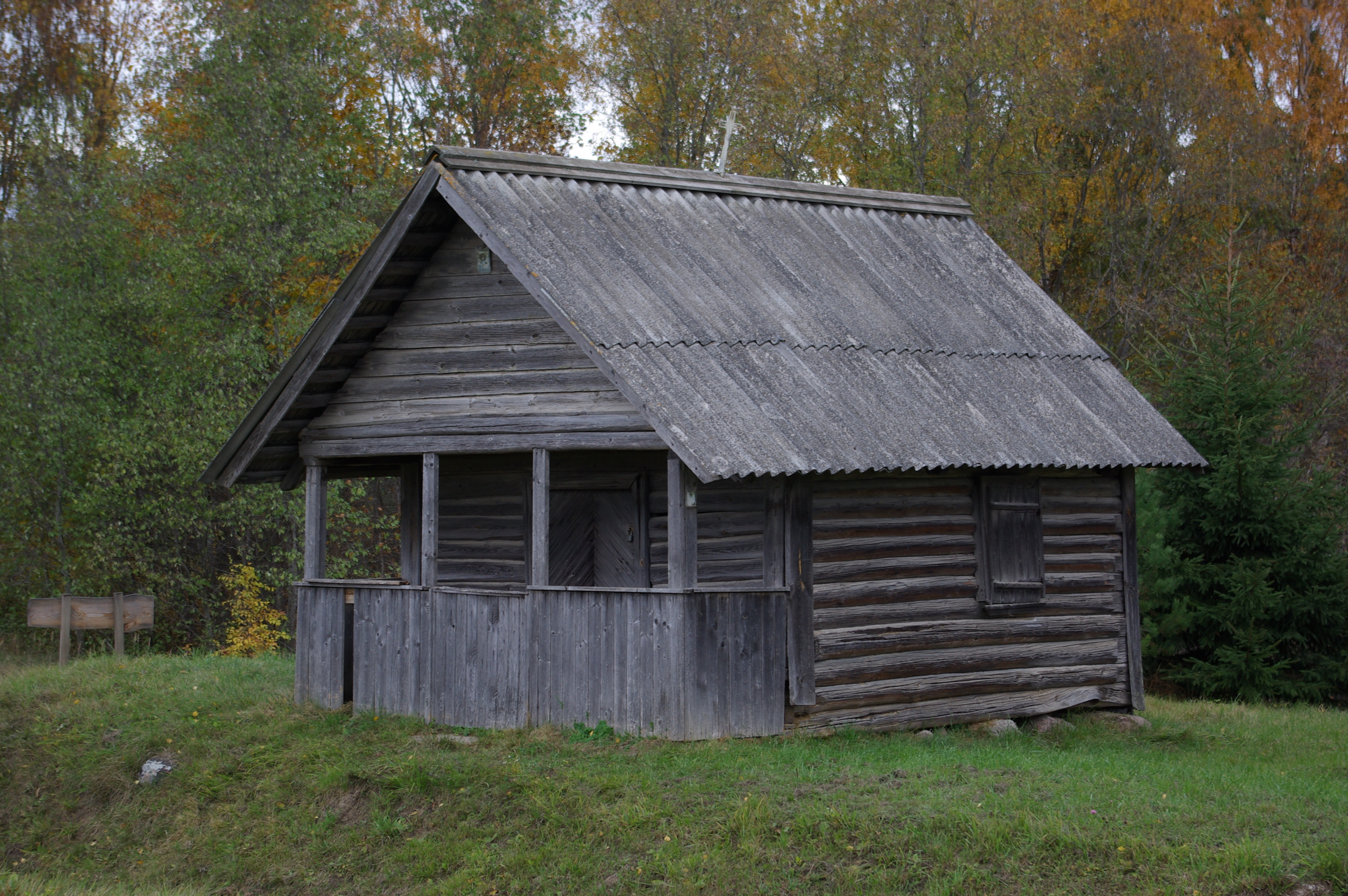 Tobrova tsässon